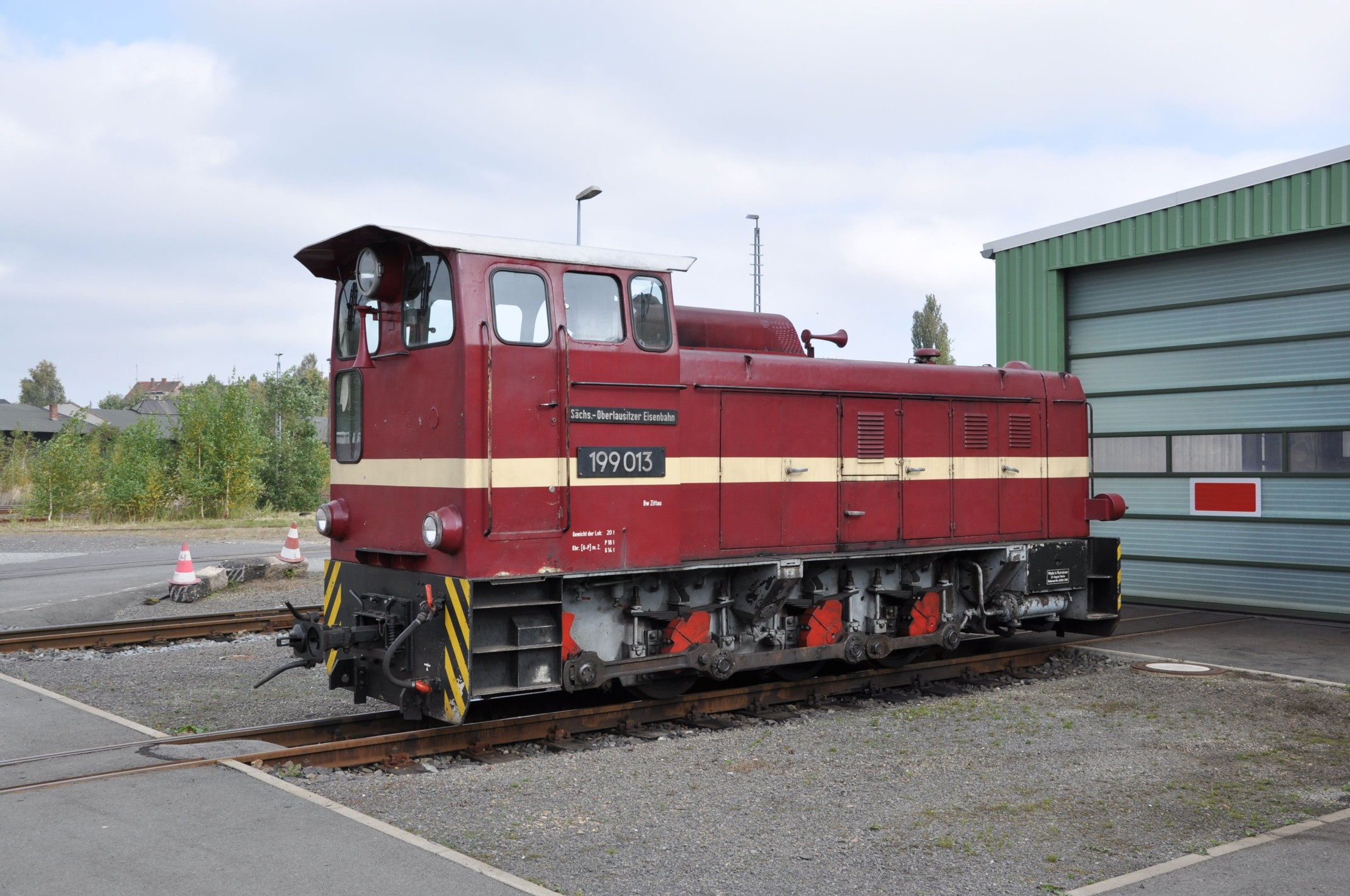 Diesellokomotive 199 013 (FAUR L30H) der SOEG im Bahnhof Zittau